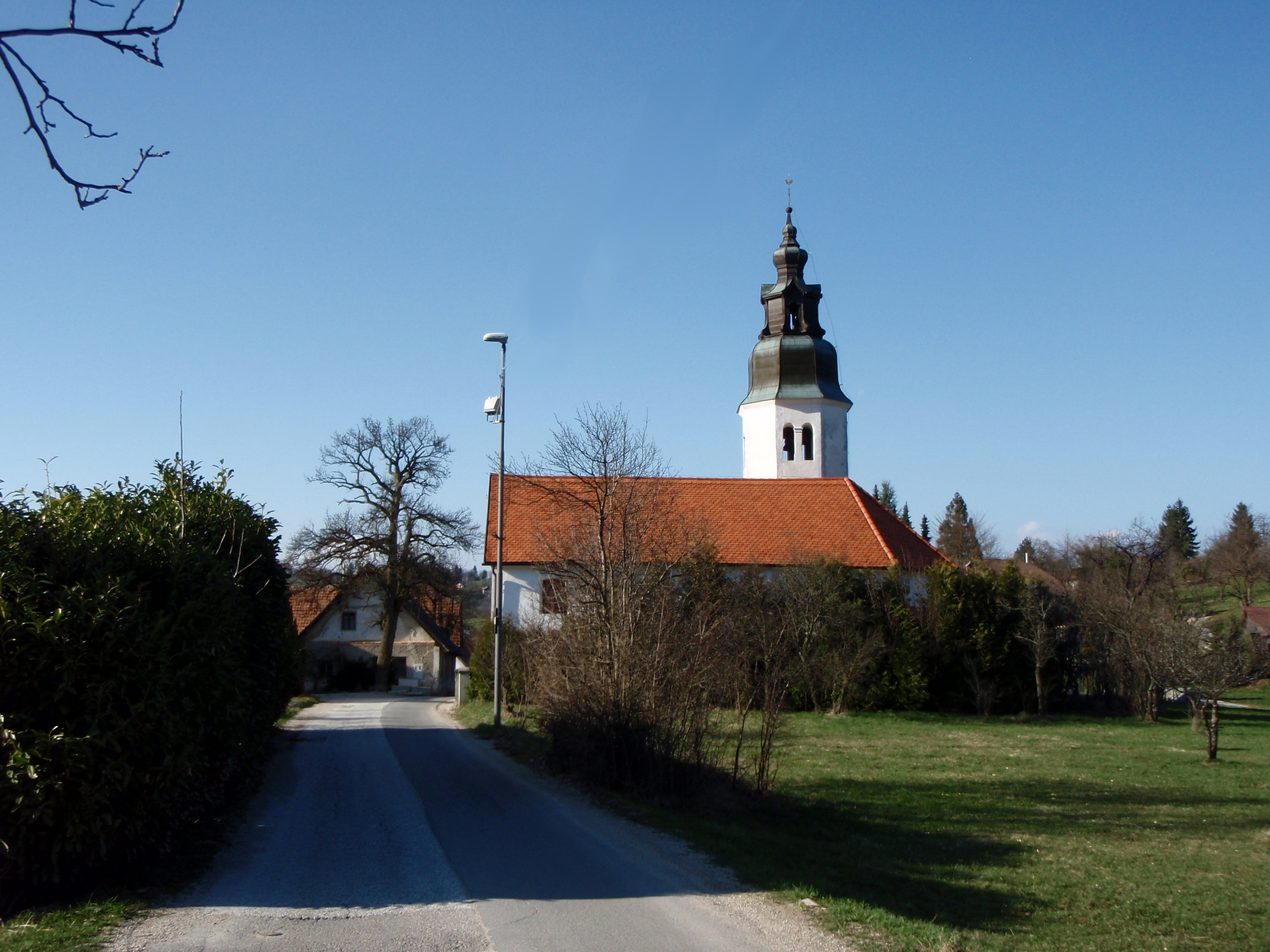 Veliko Trebeljevo, Slovenija.